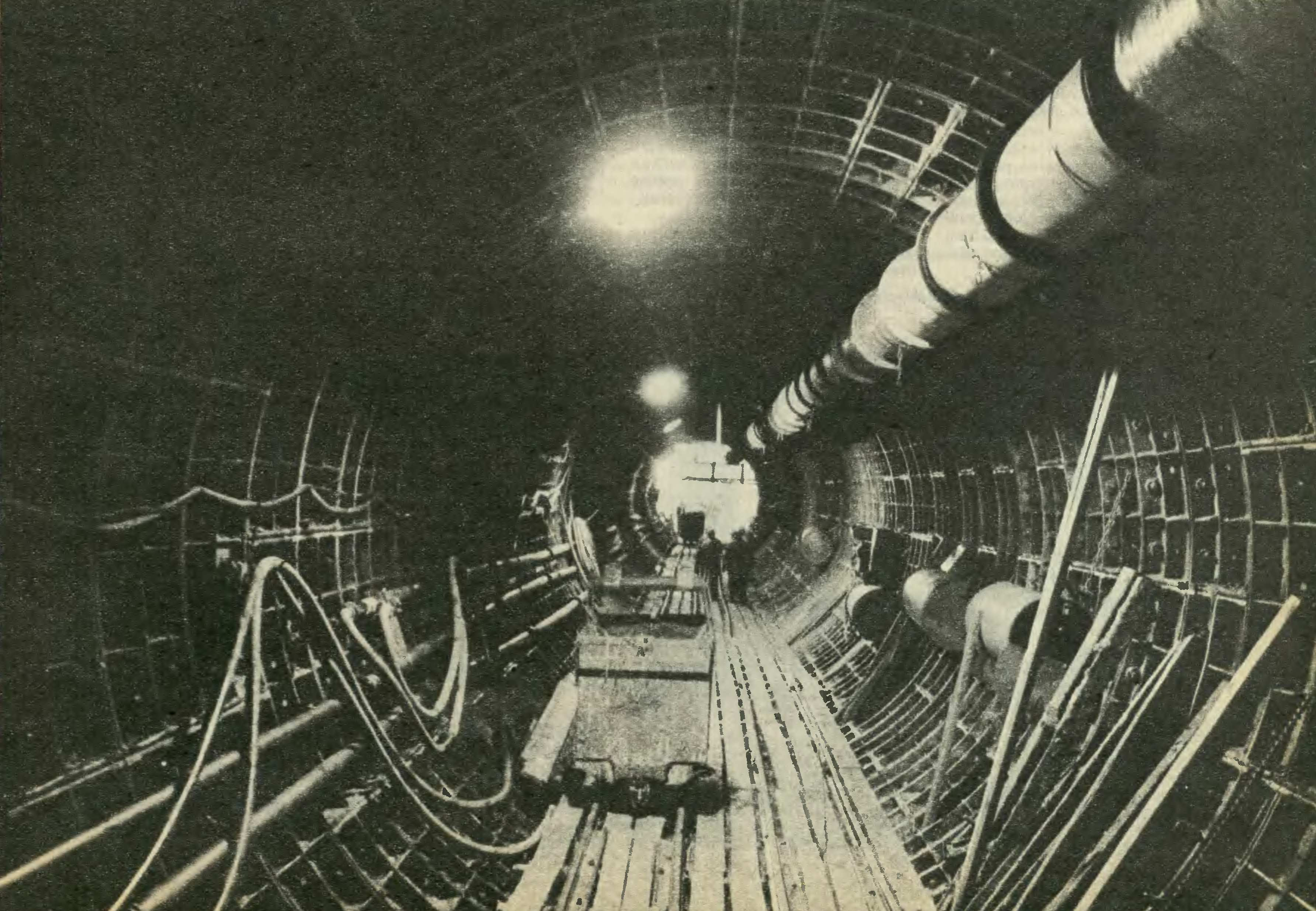 Budowa tunelu szlakowego metra B11 Pole Mokotowskie-Politechnika, czerwiec 1985.